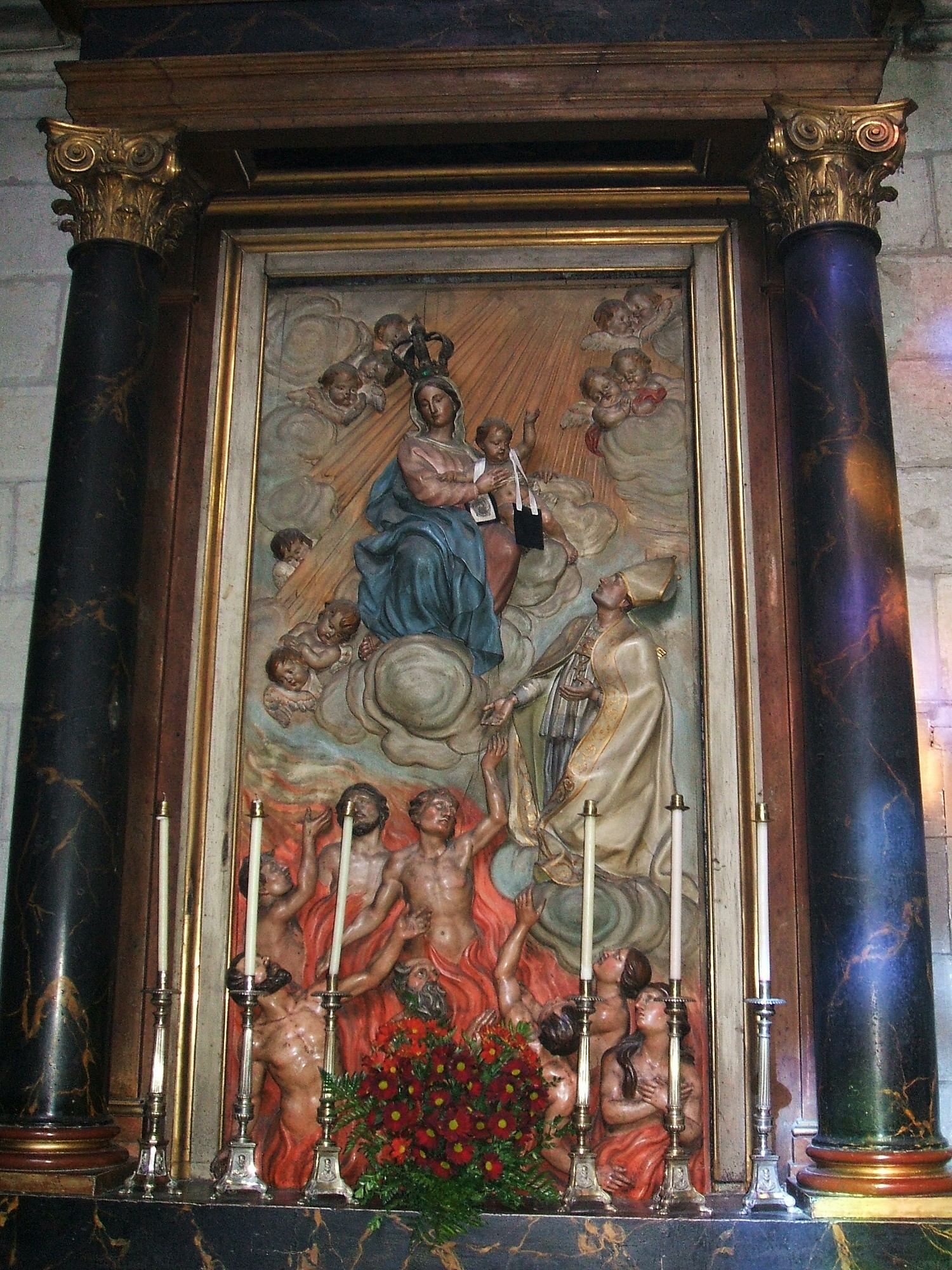 Altar de las Ánimas (s-XIX), en la Iglesia parroquial de Santa María (ex Capilla de Santiago de la Catedral de Santa María), Vitoria-Gasteiz, País Vasco, España